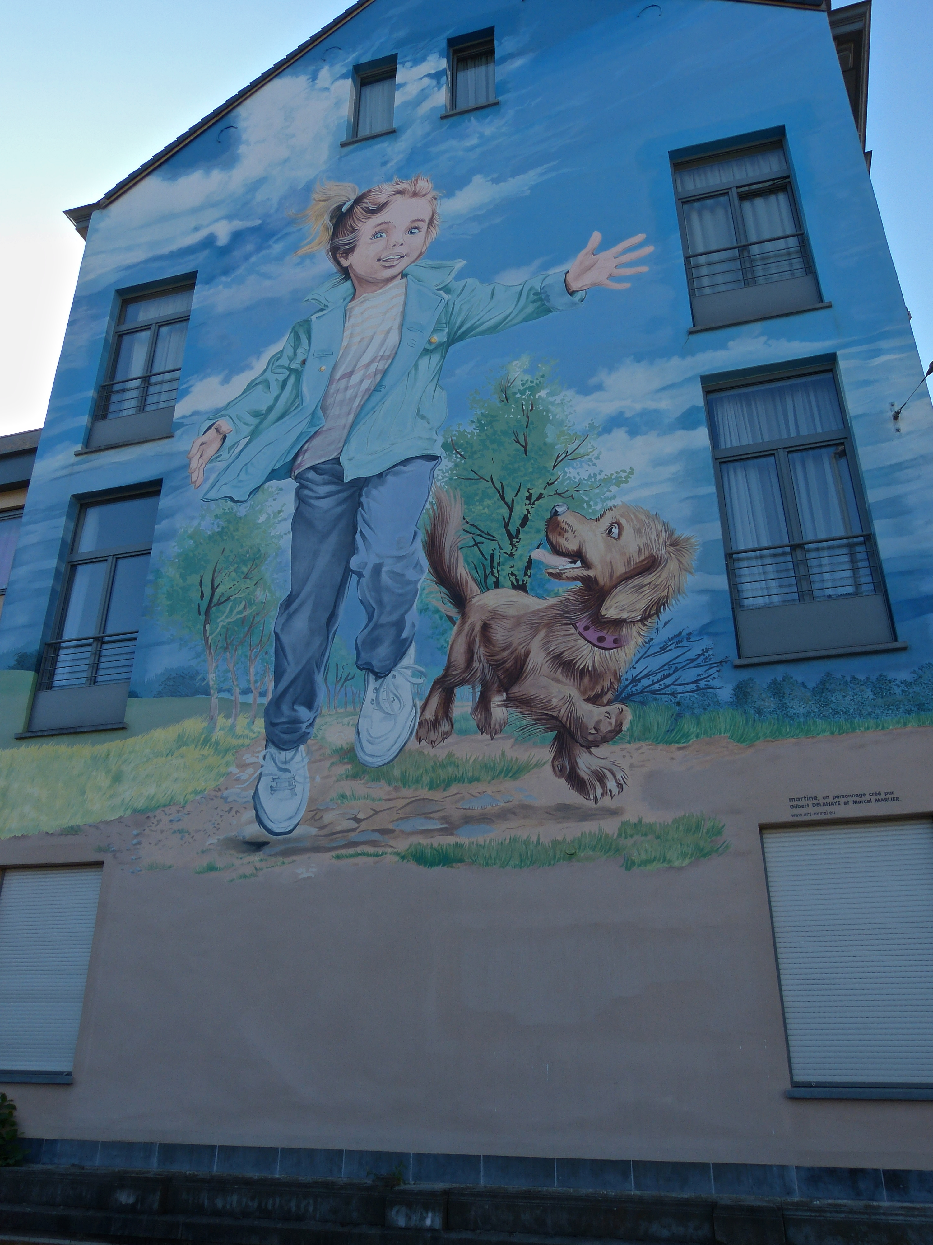 Comicwand Martine (Tiny) in Brüssel, Avenue de la Reine 325 (Laeken). Die Figur ist auf Deutsch als Martina und (in älteren Auflagen) als Steffi bekannt.